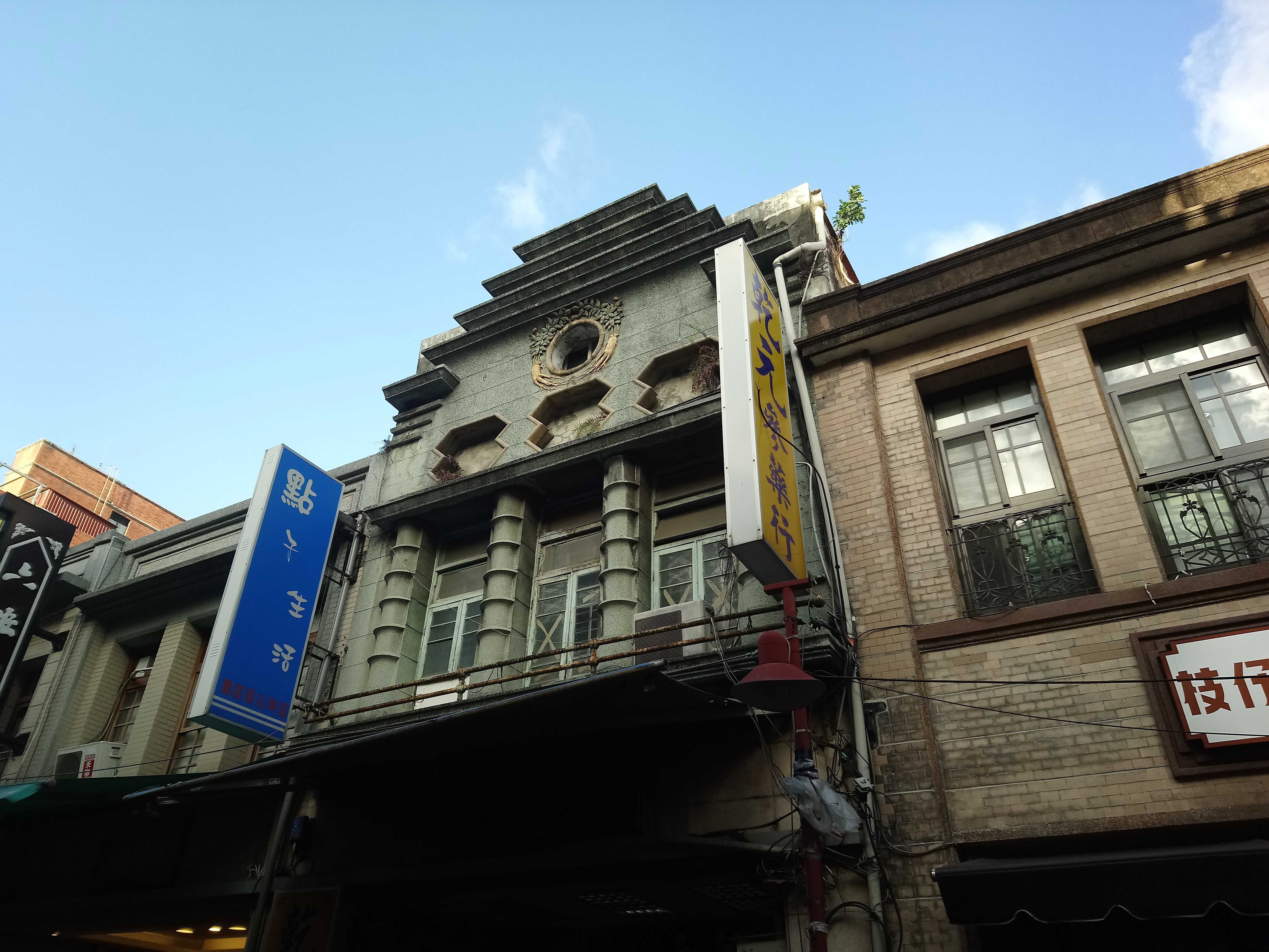 乾元參藥行,台北市大同區延平次分區永樂里